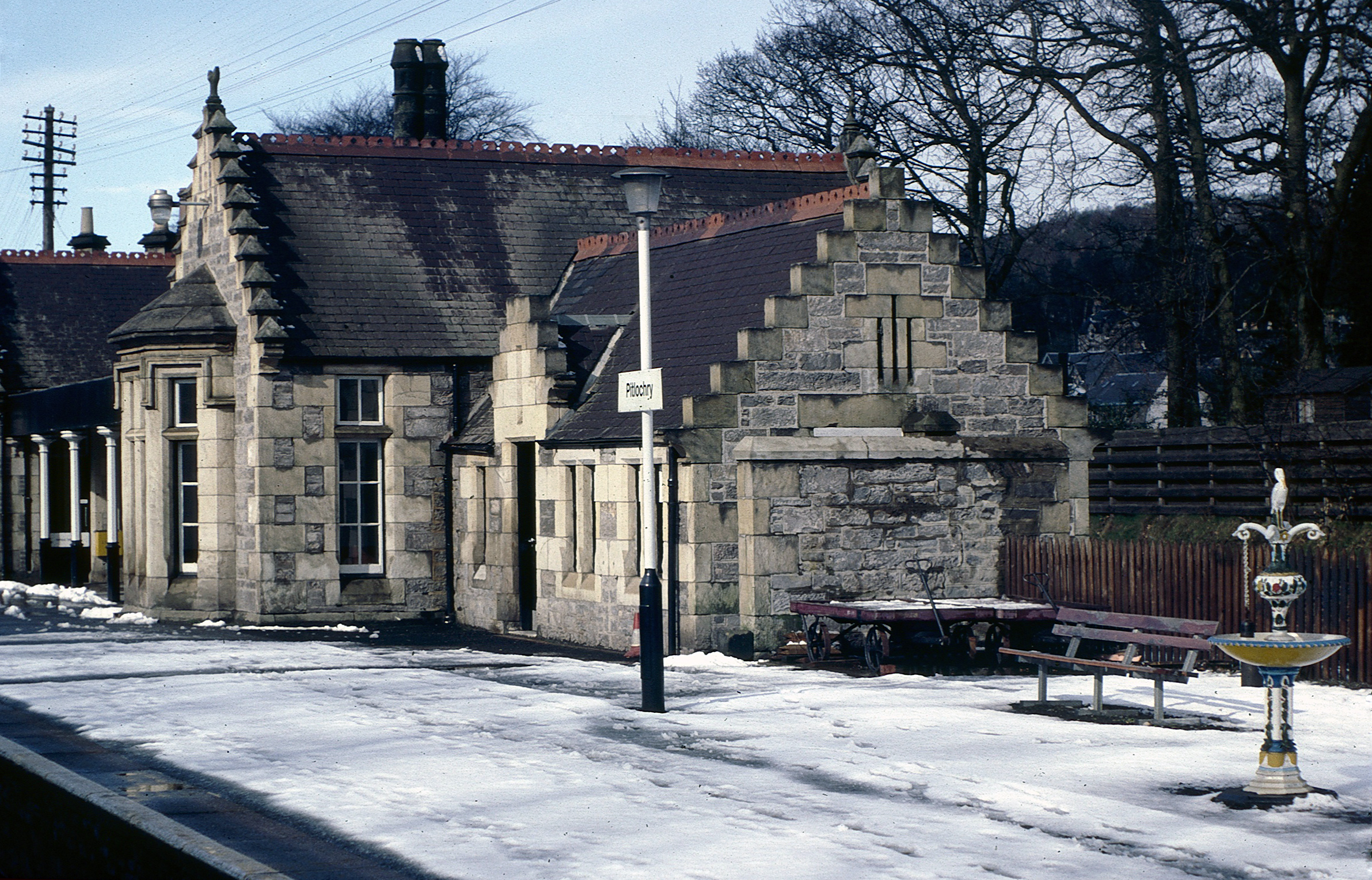 March 1982